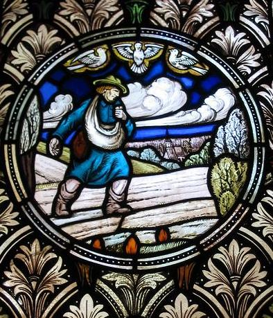 Kirche Gröben" (big church), Brandenburg, Germany